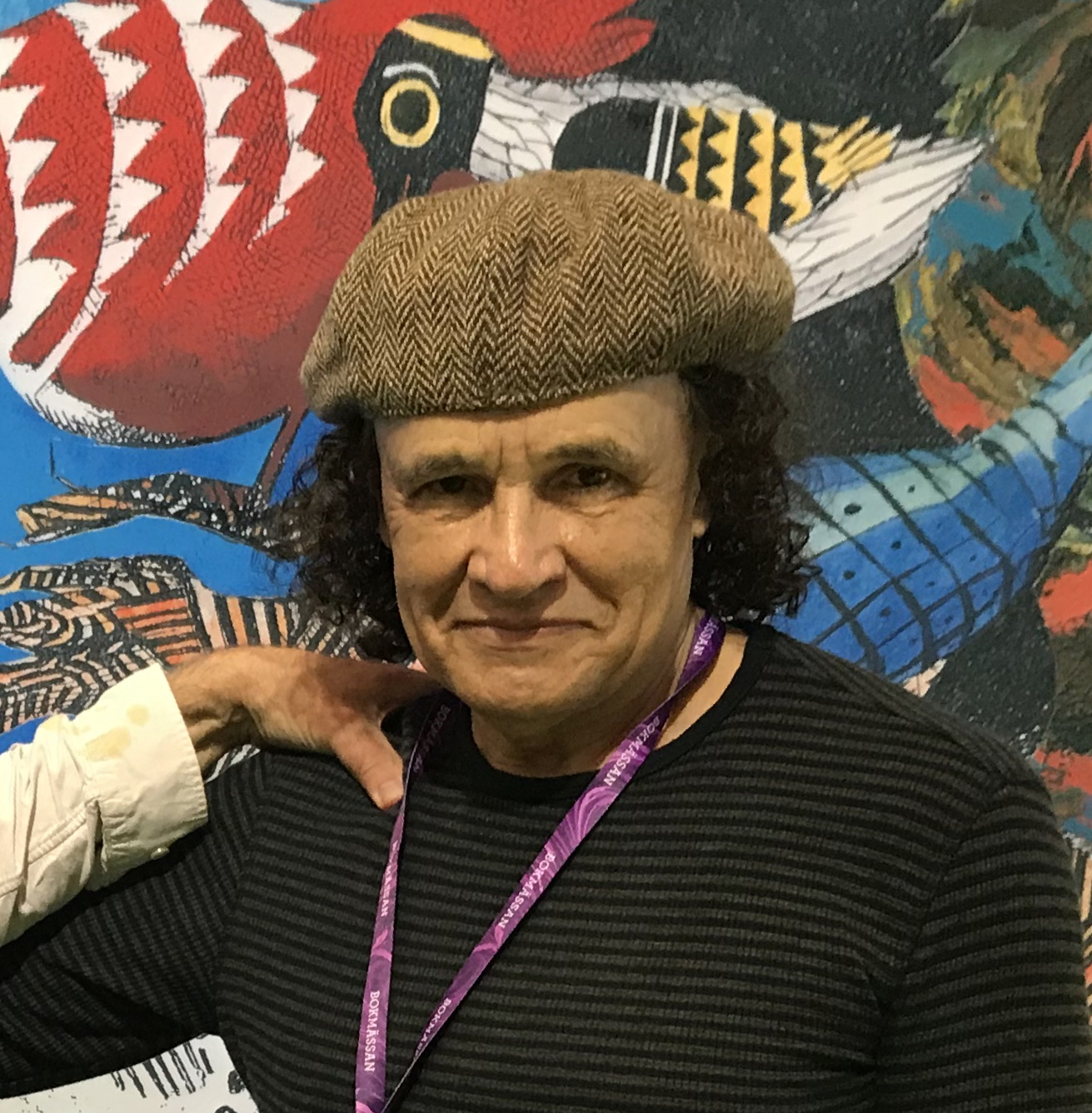 Rogério Andrade Barbosa, Bok-och Biblioteksmässan